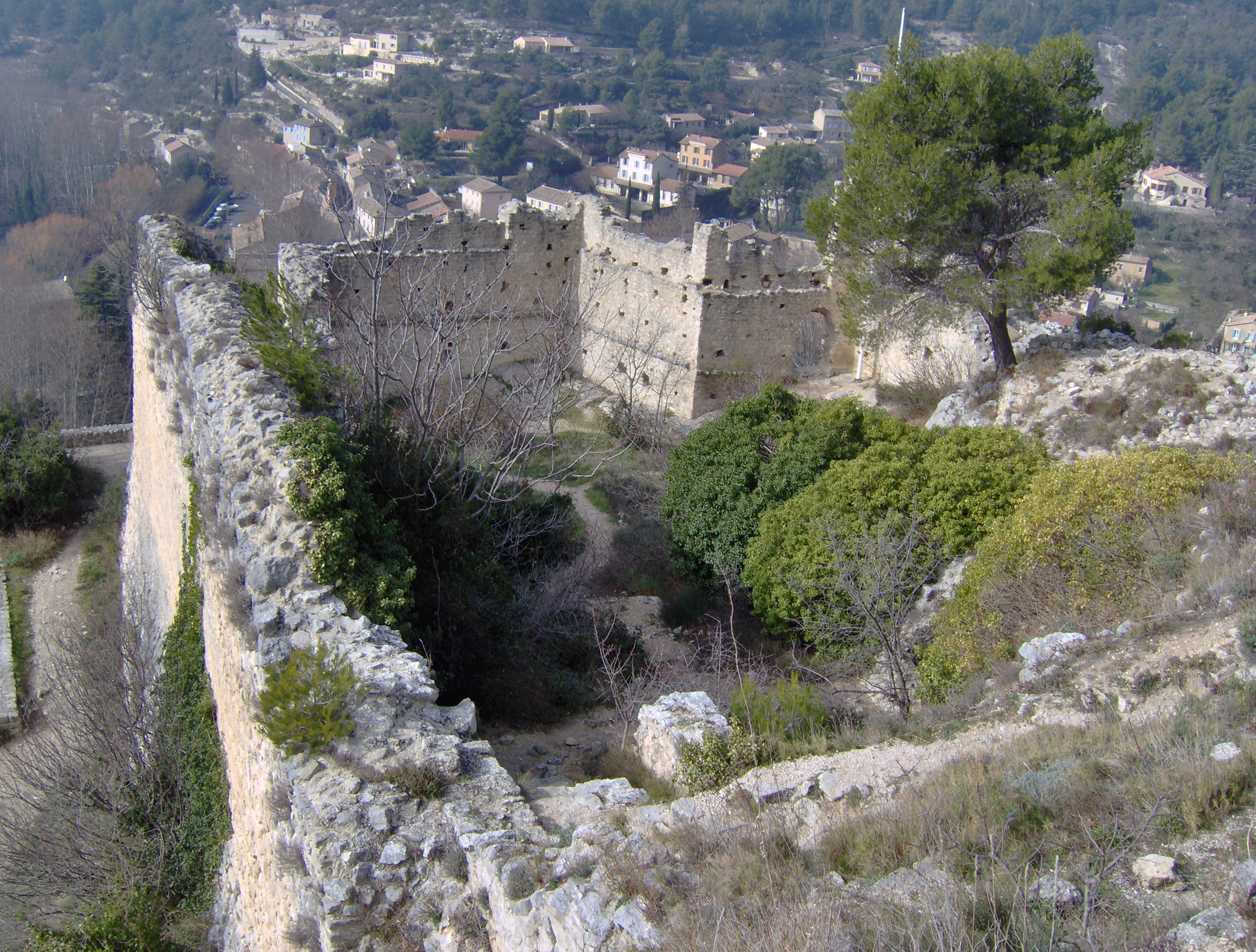 Chateau de Fontaine de Vaucluse